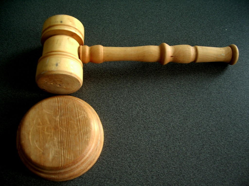 Kohtuniku töövahendid